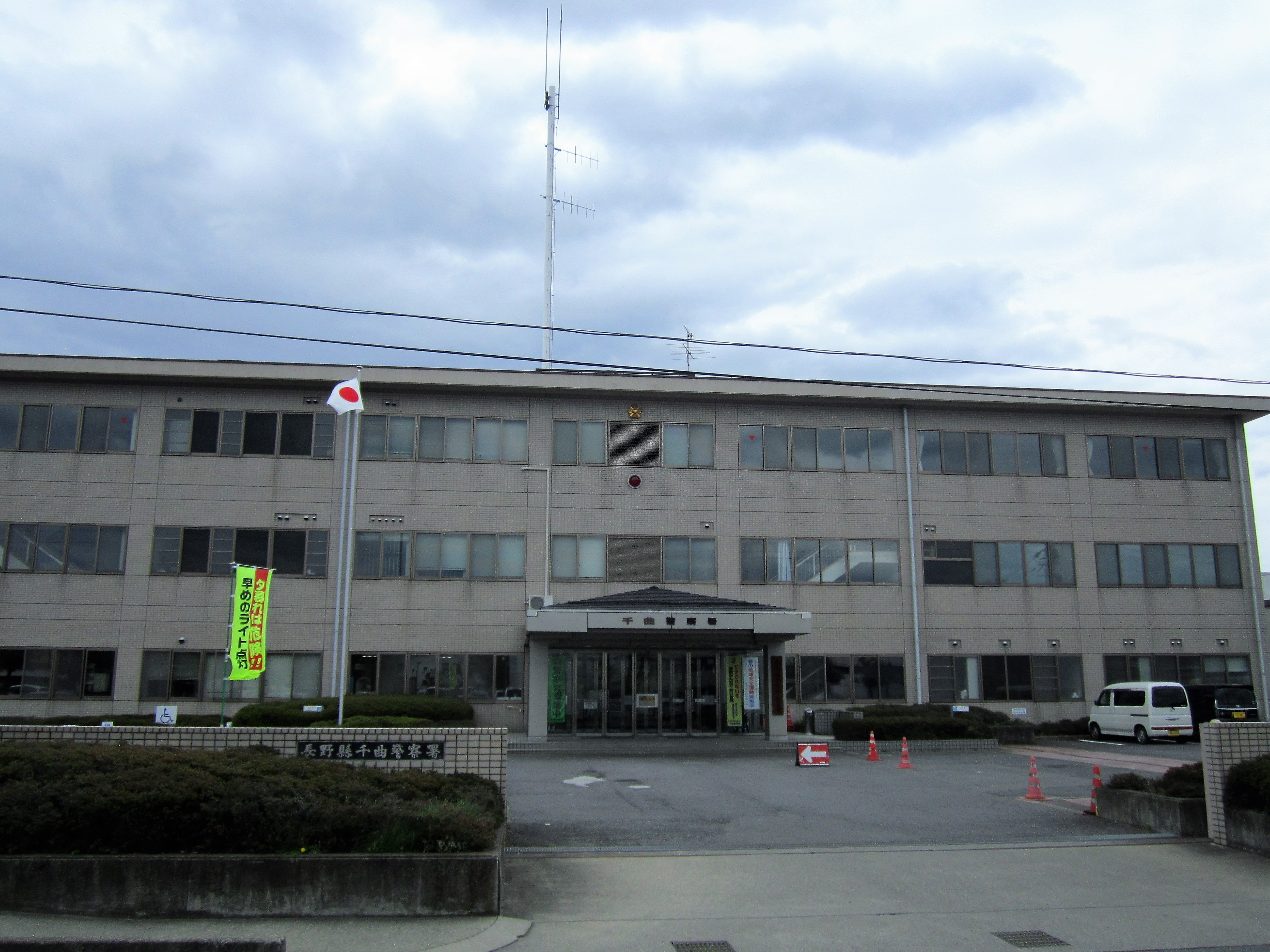 千曲警察署 Canon PowerShot A2200